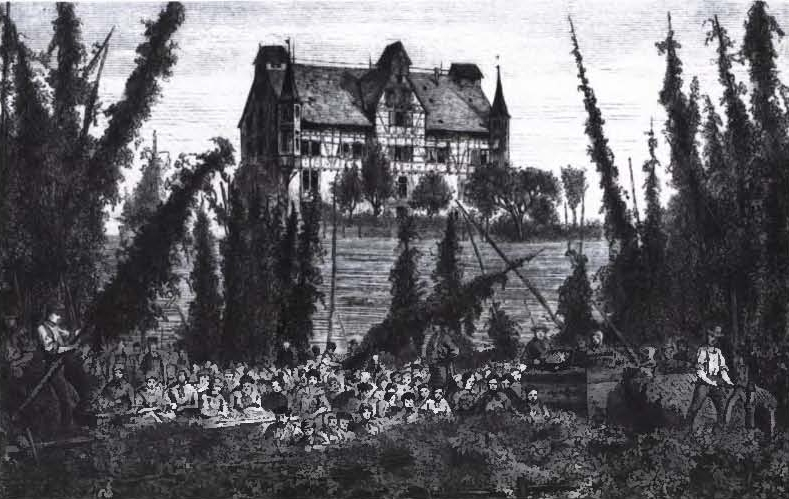 „Die Hopfenernte auf der Wirth’schen Muster-Hopfenplantage Kaltenberg bei Tettnang“ (Ausschnitt). Kolorierter Holzschnitt von Karl Jauslin, um 1875. – Hinten: Israel Friedrich Wirths „Hopfenburg“, ein Hopfentrockengebäude.